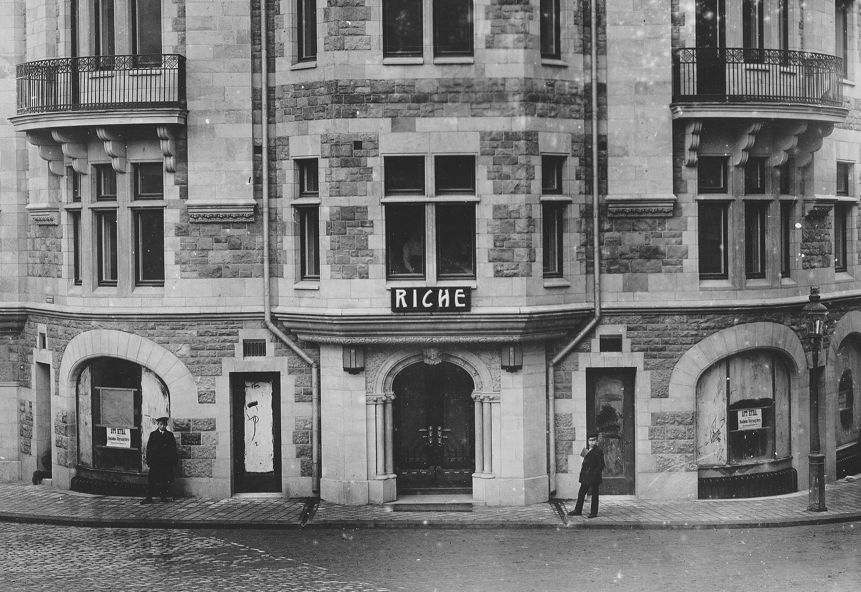 Kvarteret Matrosen, Birger Jarlsgatan 2-3 restaurang Riche, nuvarande Teatergrillen